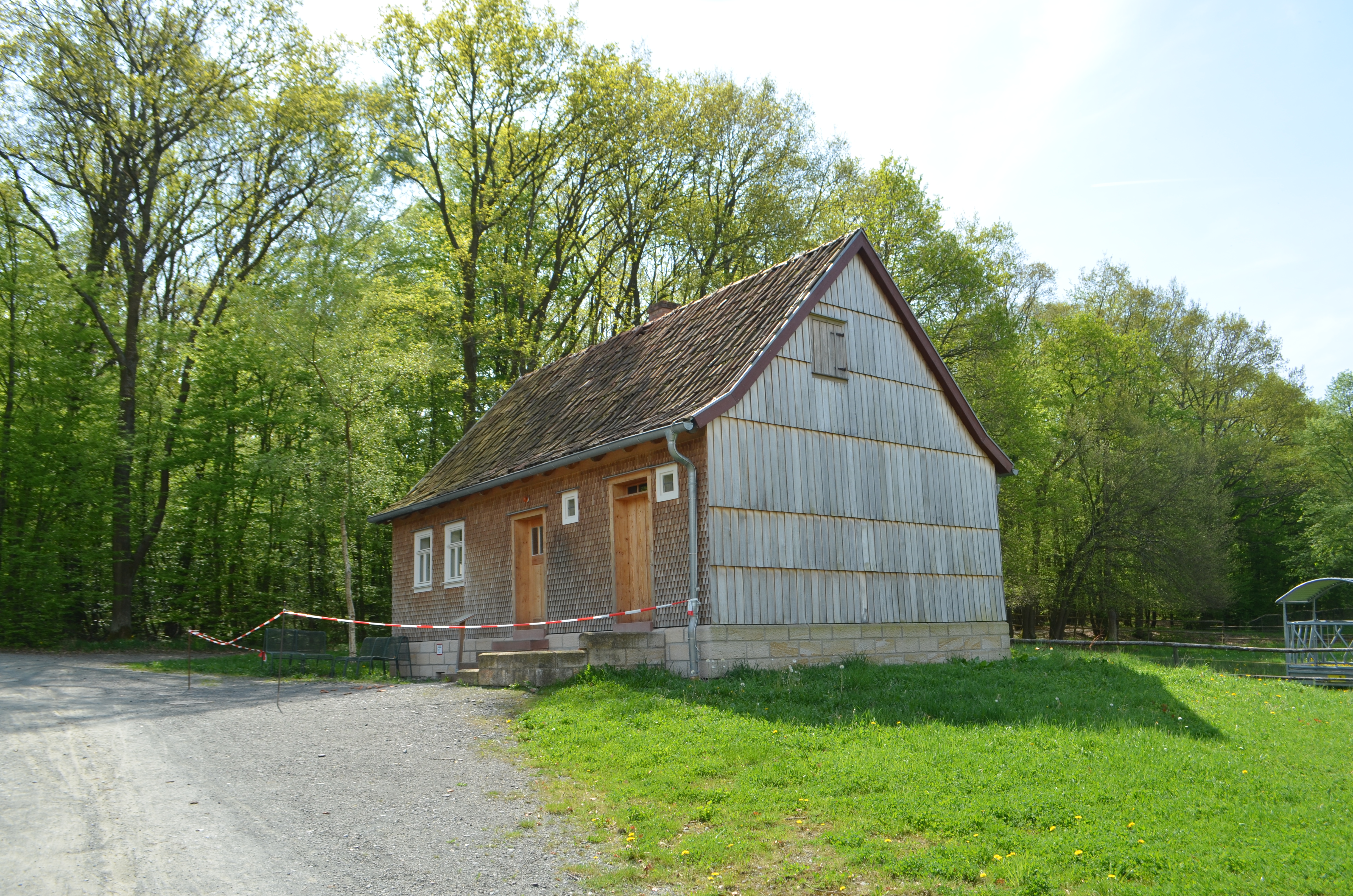 Hessenpark, Altenteilerhaus aus Sieblos